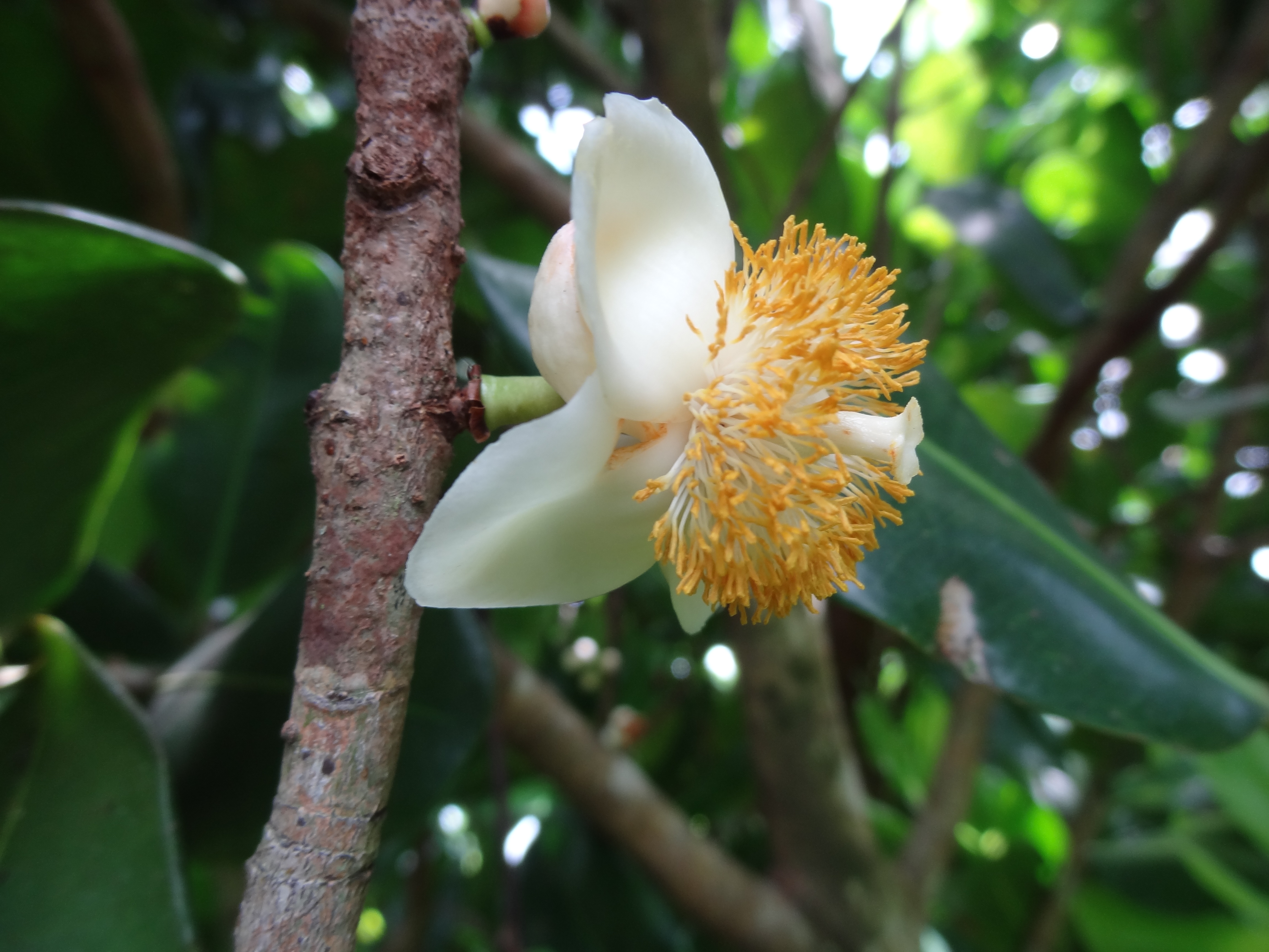 Fruit sur l'arbre